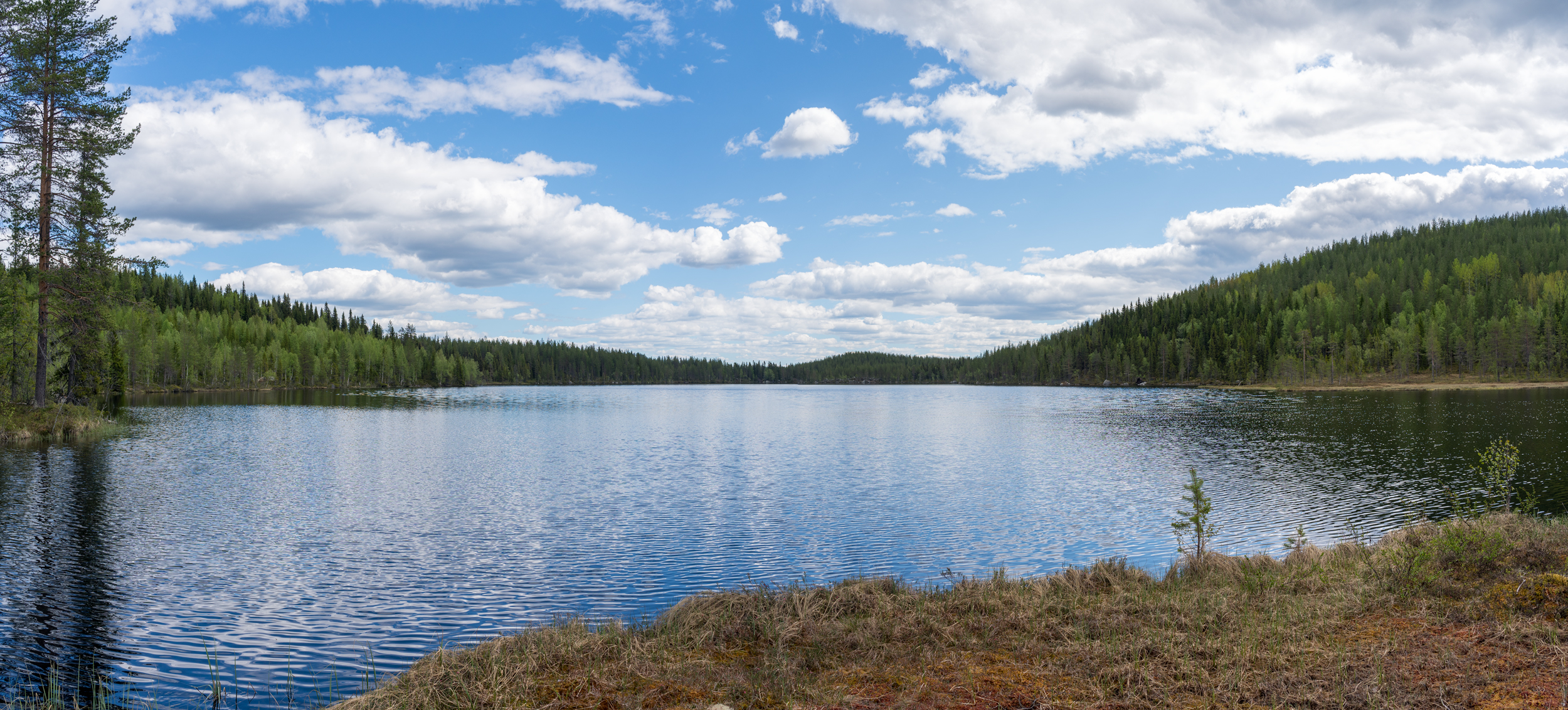 Norr-Gällarsjön - vy från västra sidan.